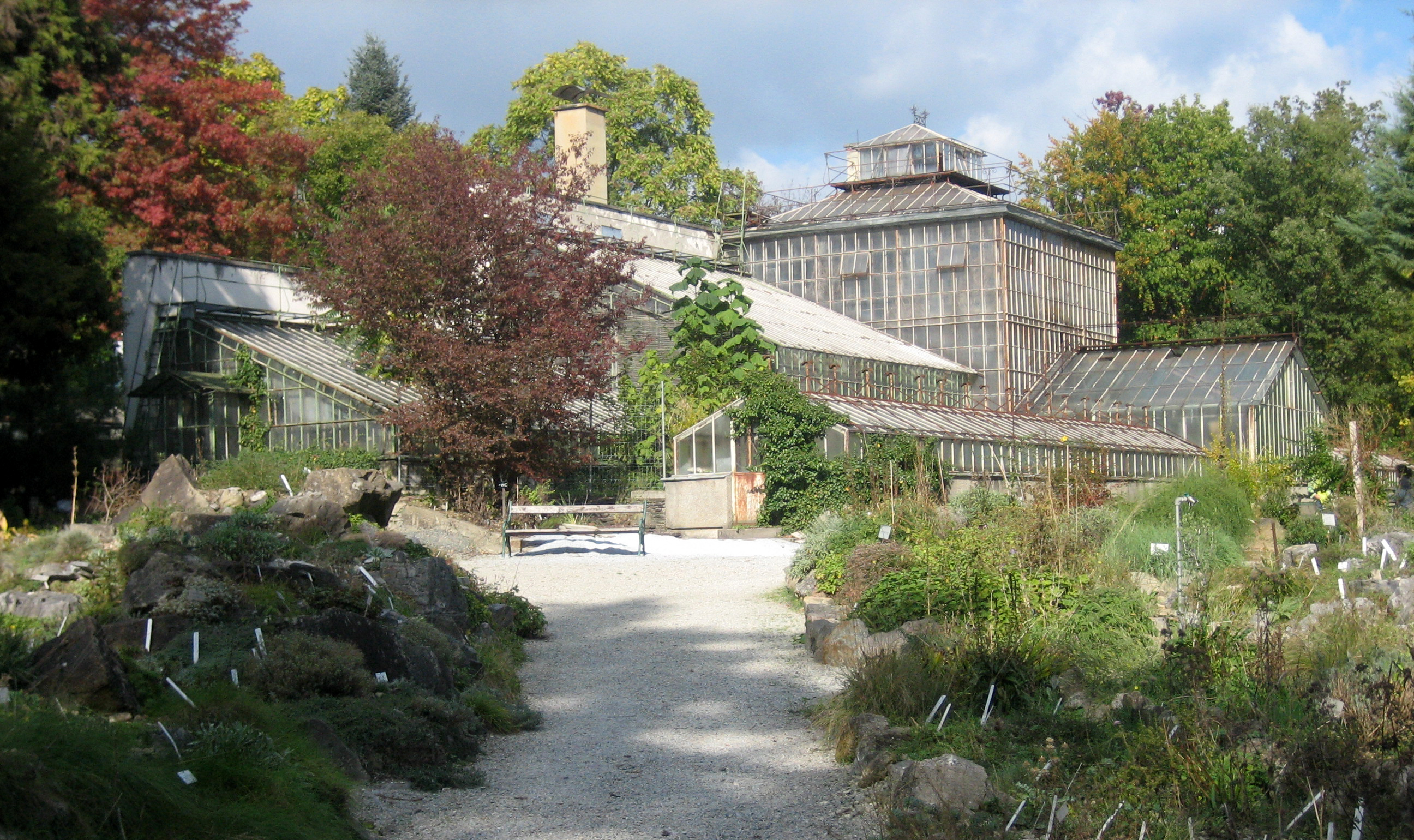 Glashaus, Gewächshausanlage im Botanischen Garten der Karl-Franzens-Universität